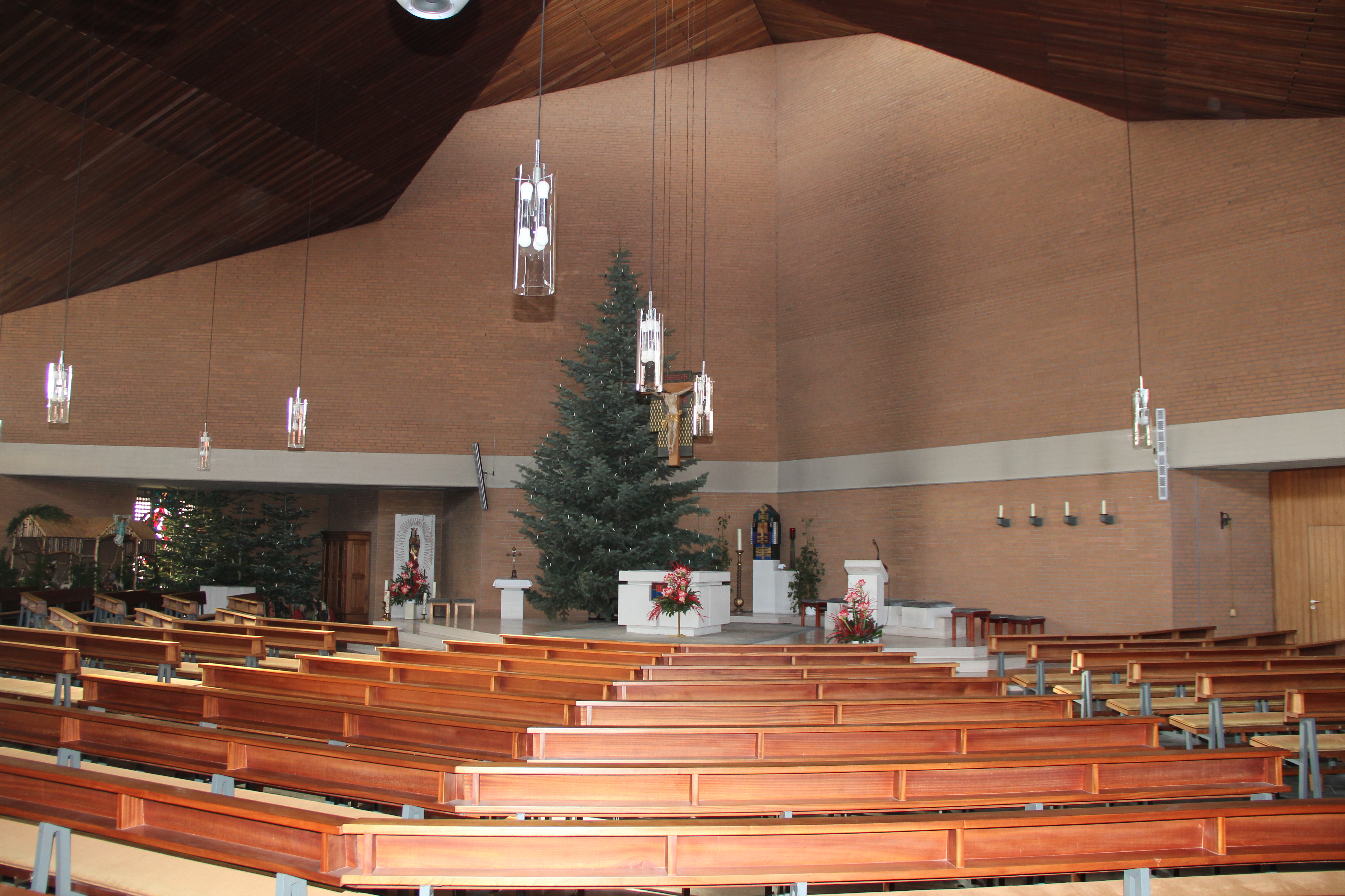 Innenansicht der Kirche Mariä Geburt in Gerblingerode (Eichsfeld)